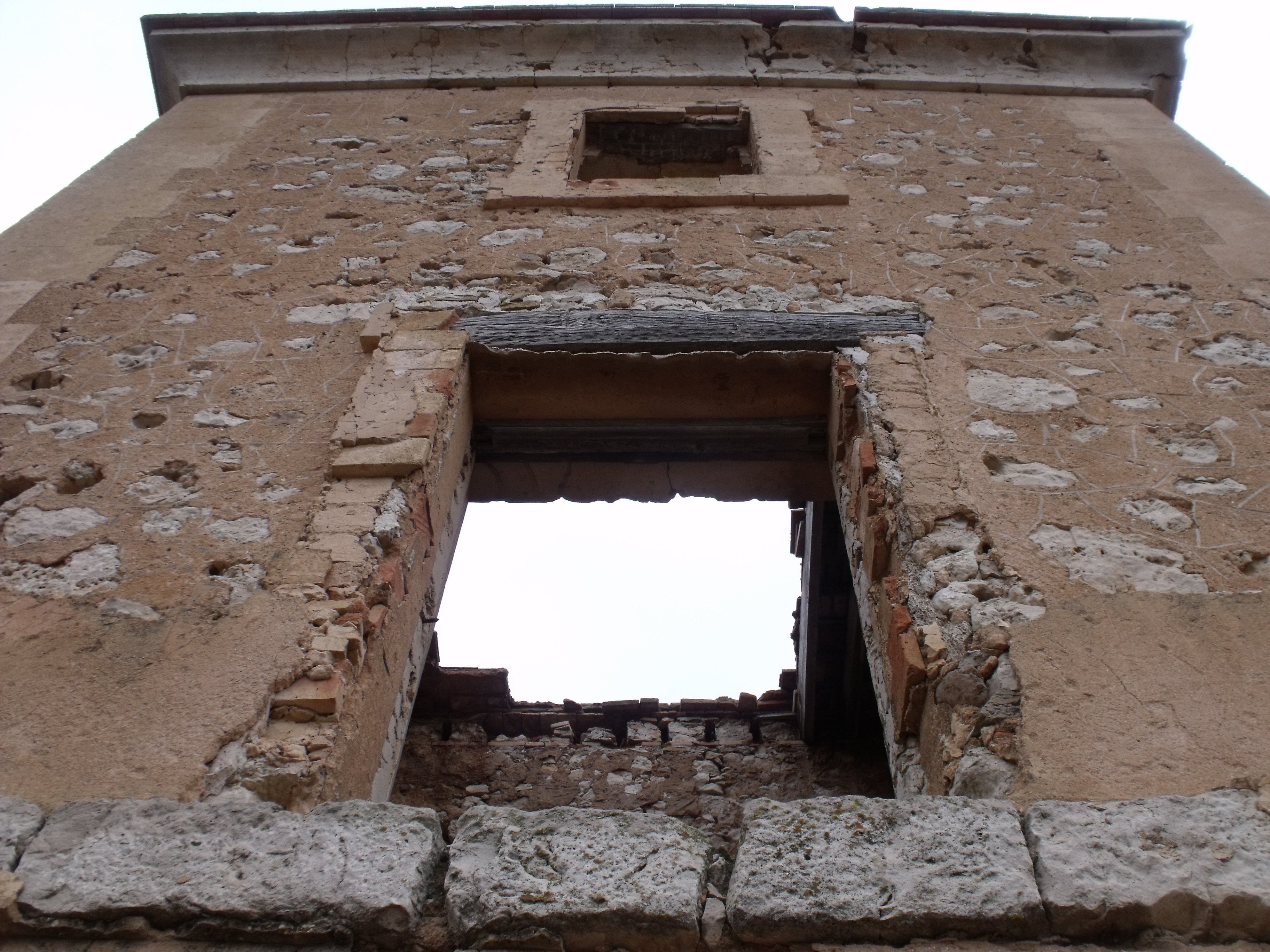 Diversas vistas de la torre de telegrafía óptica de la Atalaya de Requena